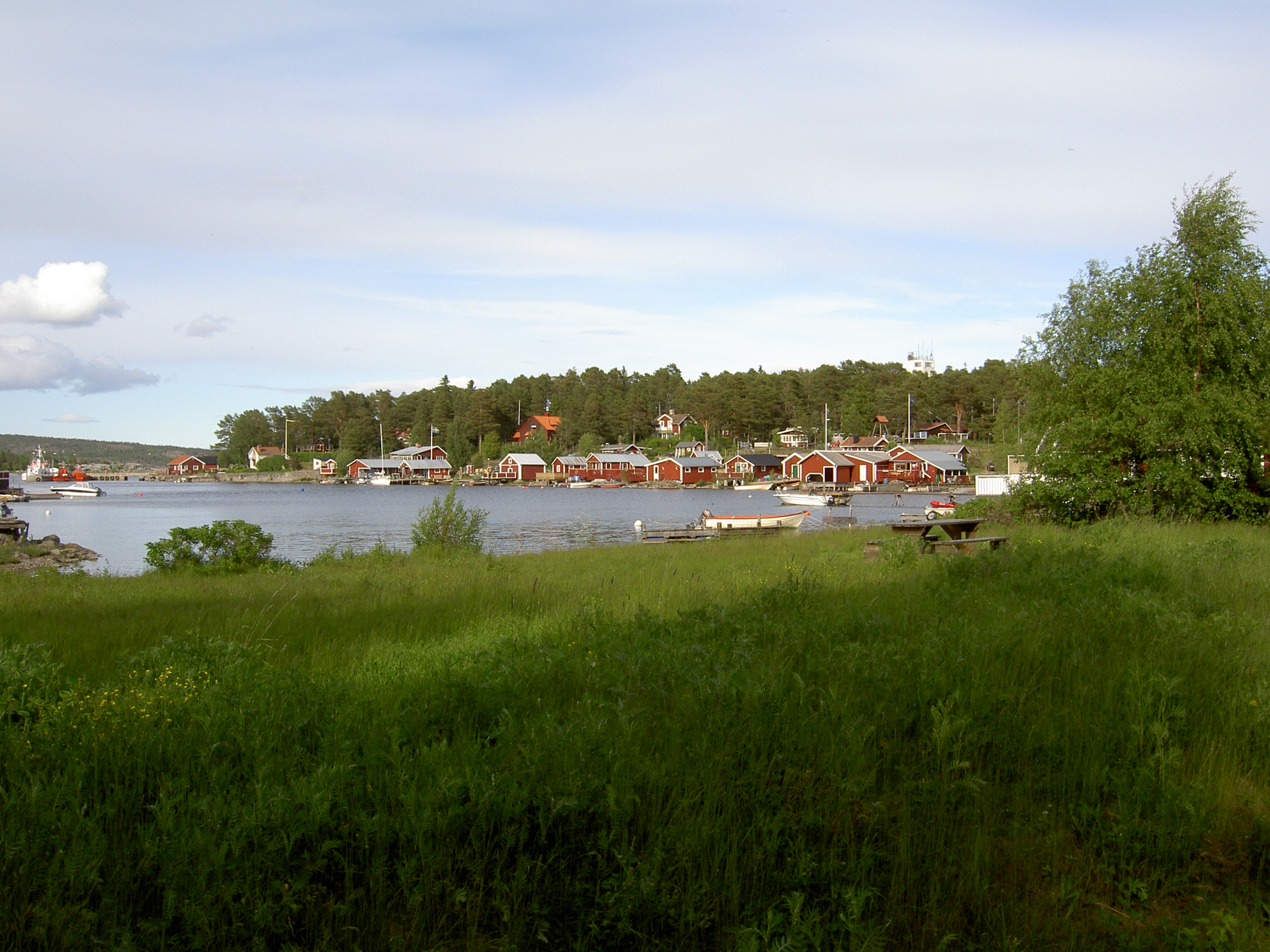 Spikarna. Ön Skorven sedd från den större ön Alnön. Bilden kan fogas ihop med bilden Spikarna 02 till en panoramabild.